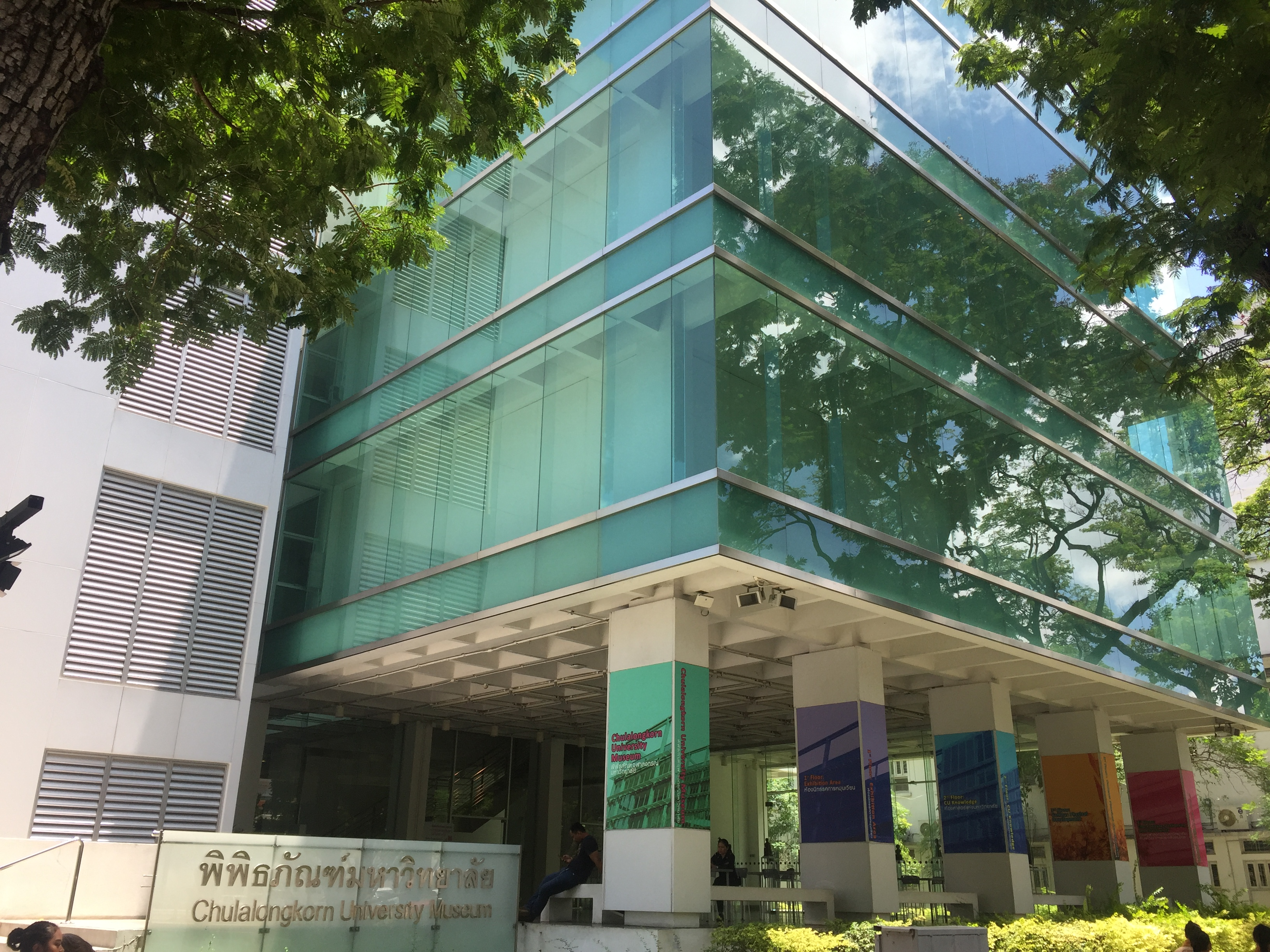 ด้านหน้าอาคารพิพิธภัณฑ์มหาวิทยาลัย